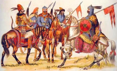 guerriers magyars